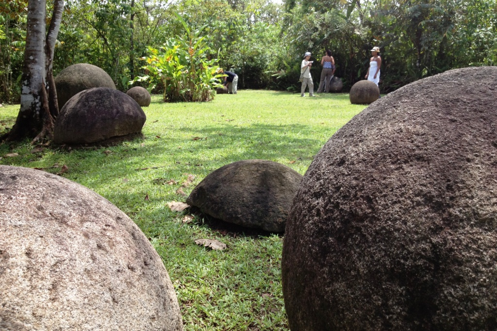 Algunas de las esferas de piedra que se encuentran en Finca 6 al cuidado del Museo Nacional de Costa Rica